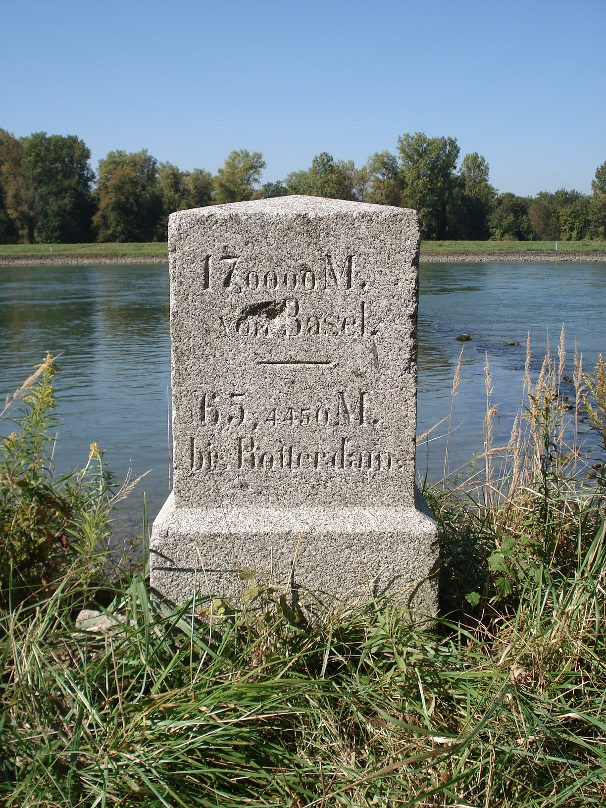 Myriameterstein 17, rechtsrheinisch, in Rastatt-Wintersdorf, Landseite